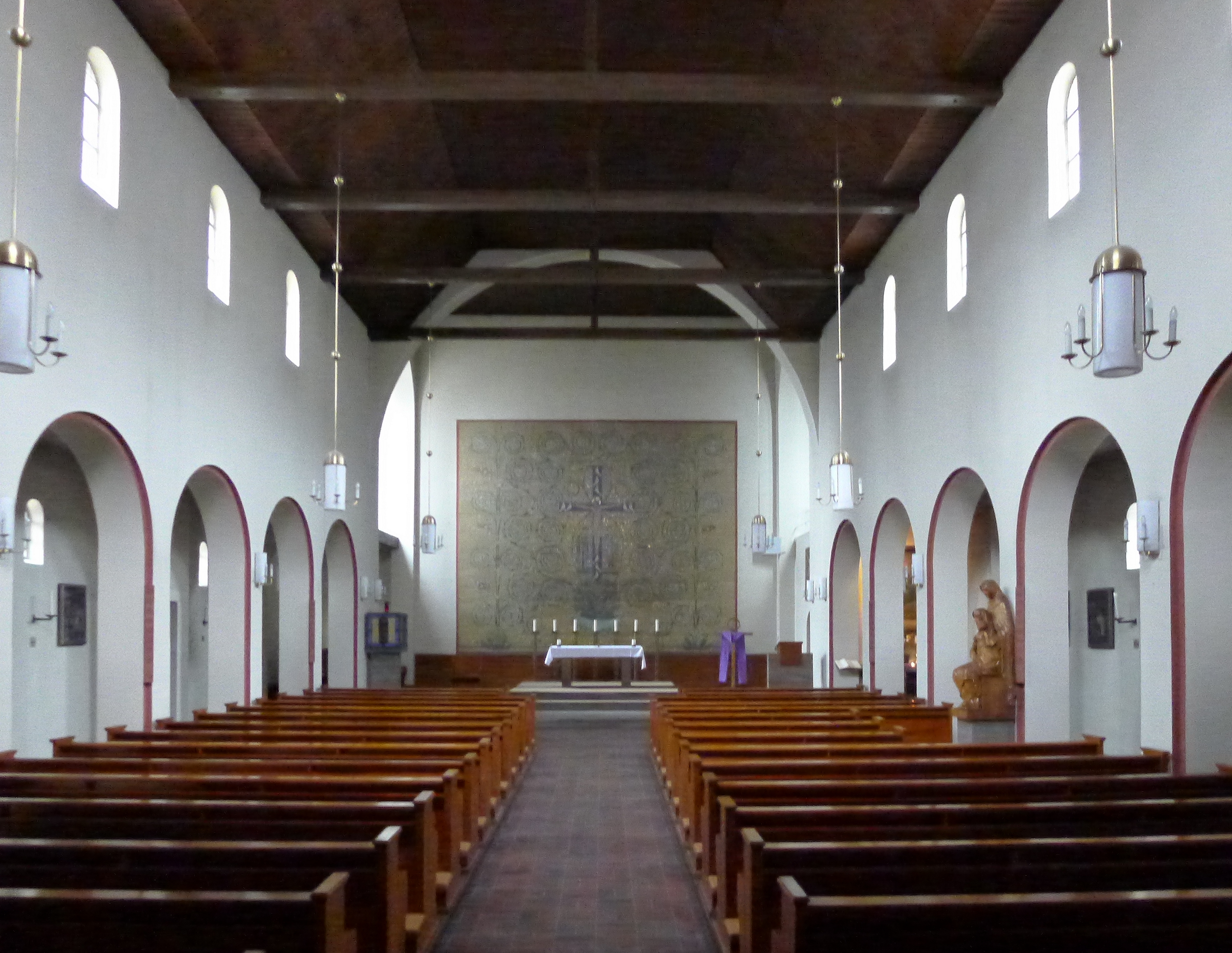 Mittelschiff mit Blick zum Altar